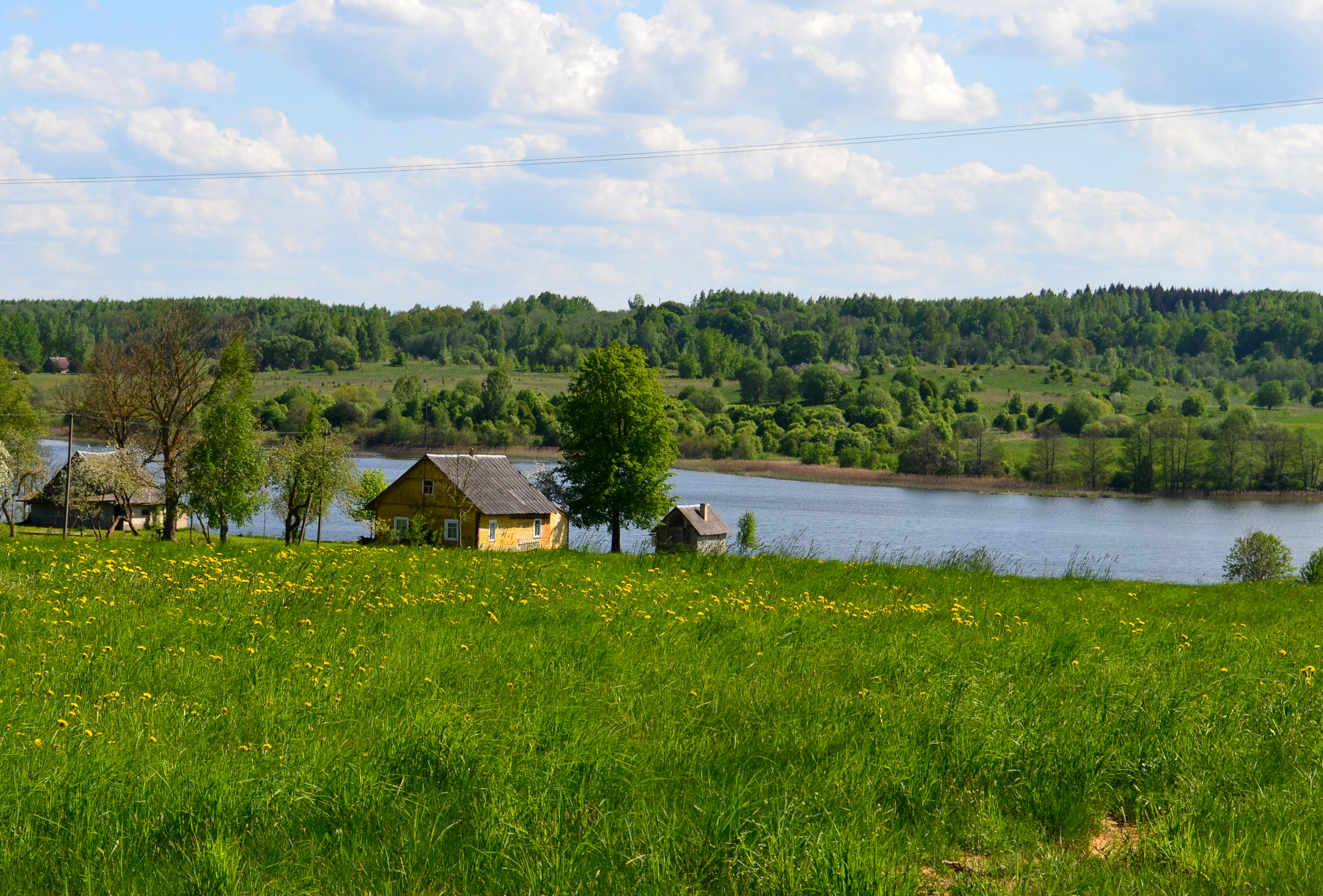 Čereškos, Balninkų sen., Molėtų raj.